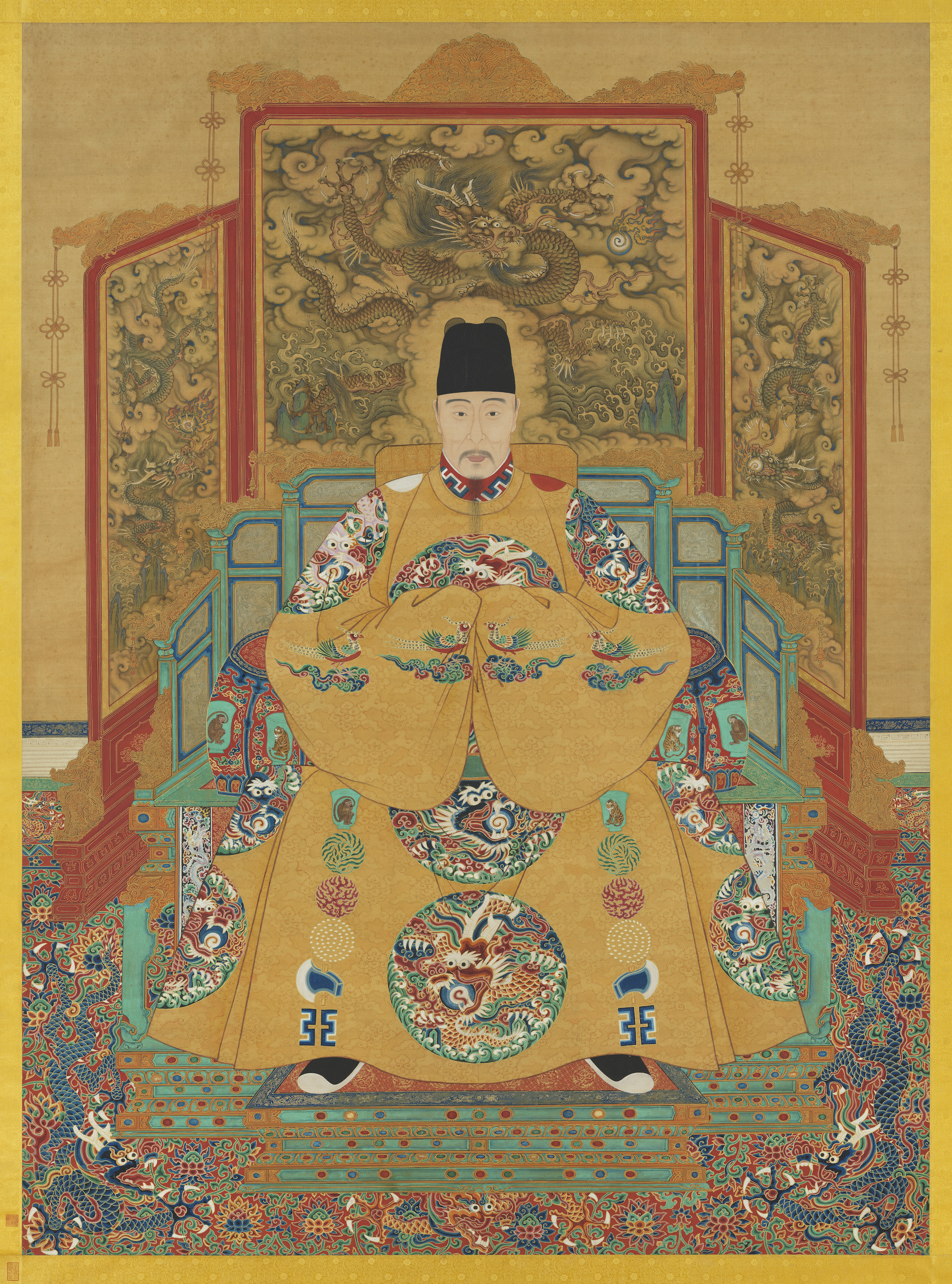 明世宗坐像 軸